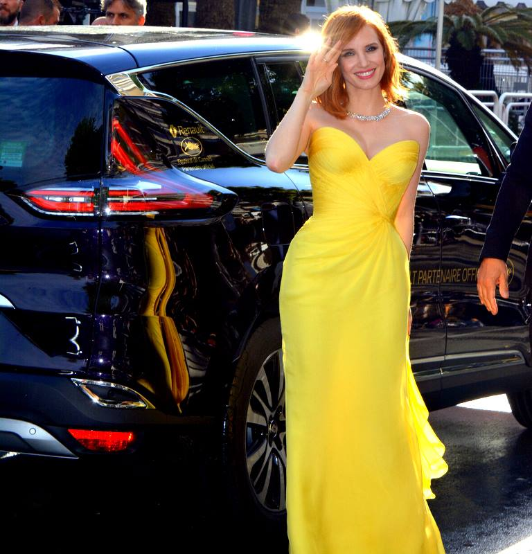 Jessica Chastain au festival de Cannes